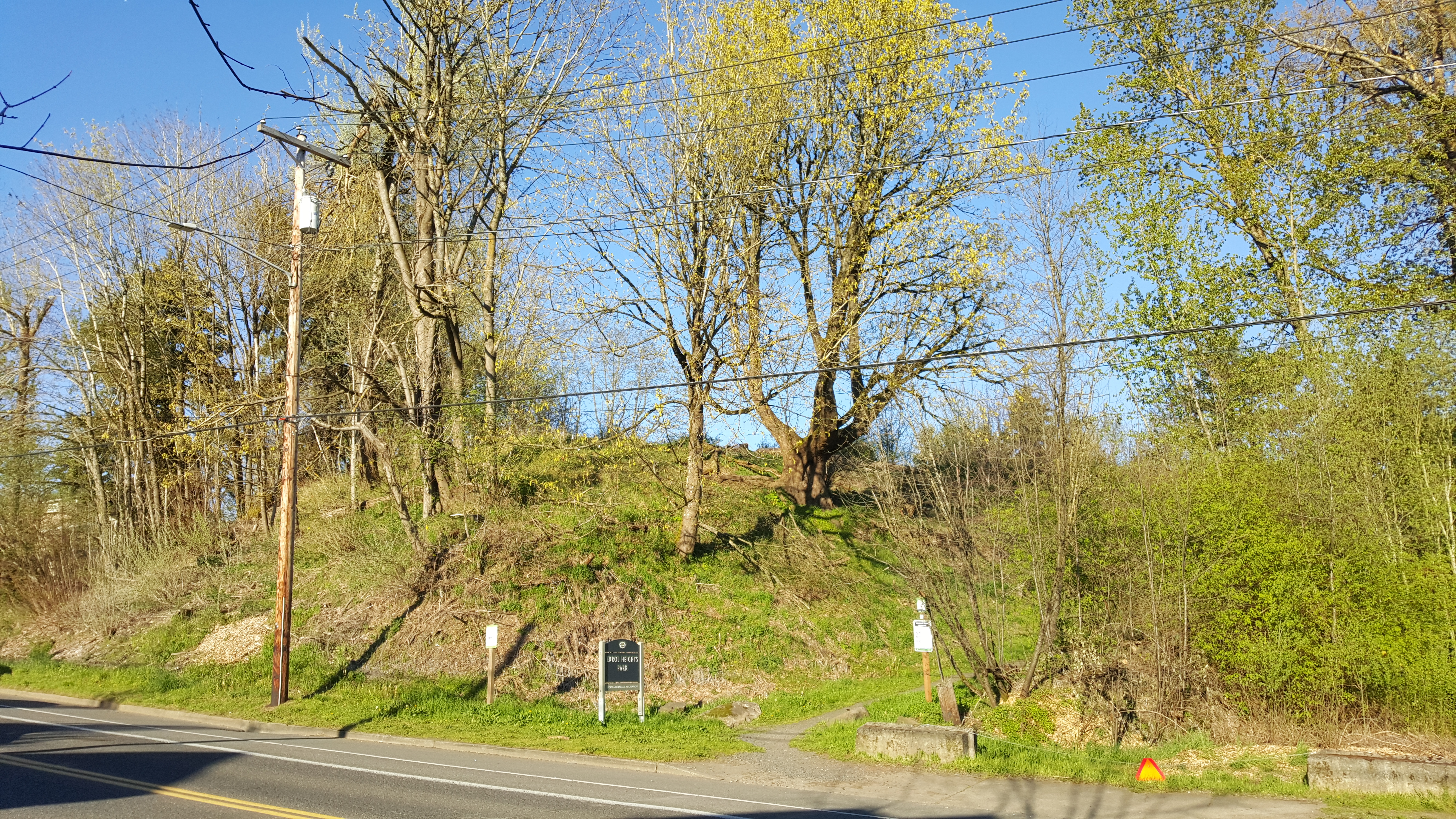 Errol Heights Park